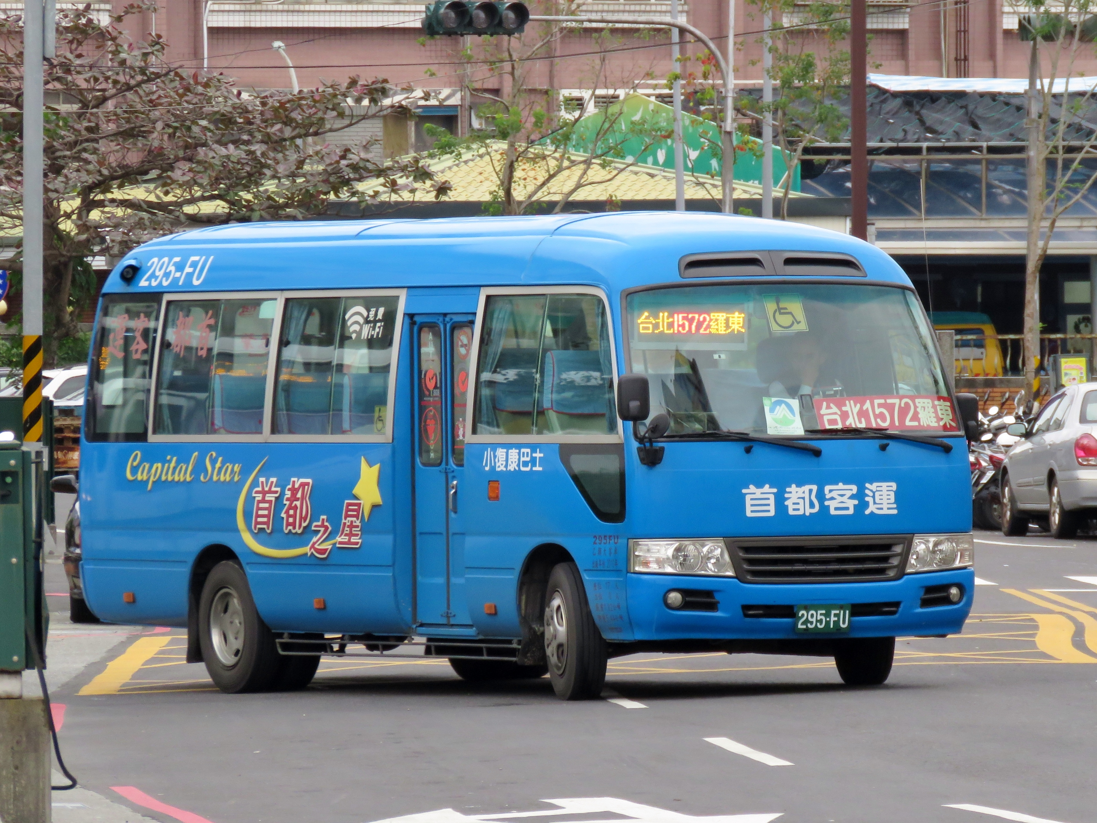 中文（台灣）: 2010 Toyota Coaster XZB50L-ZEMSYR 1572 295-FU 首都之星中型復康巴士